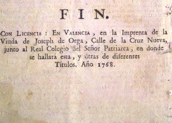 Impressors